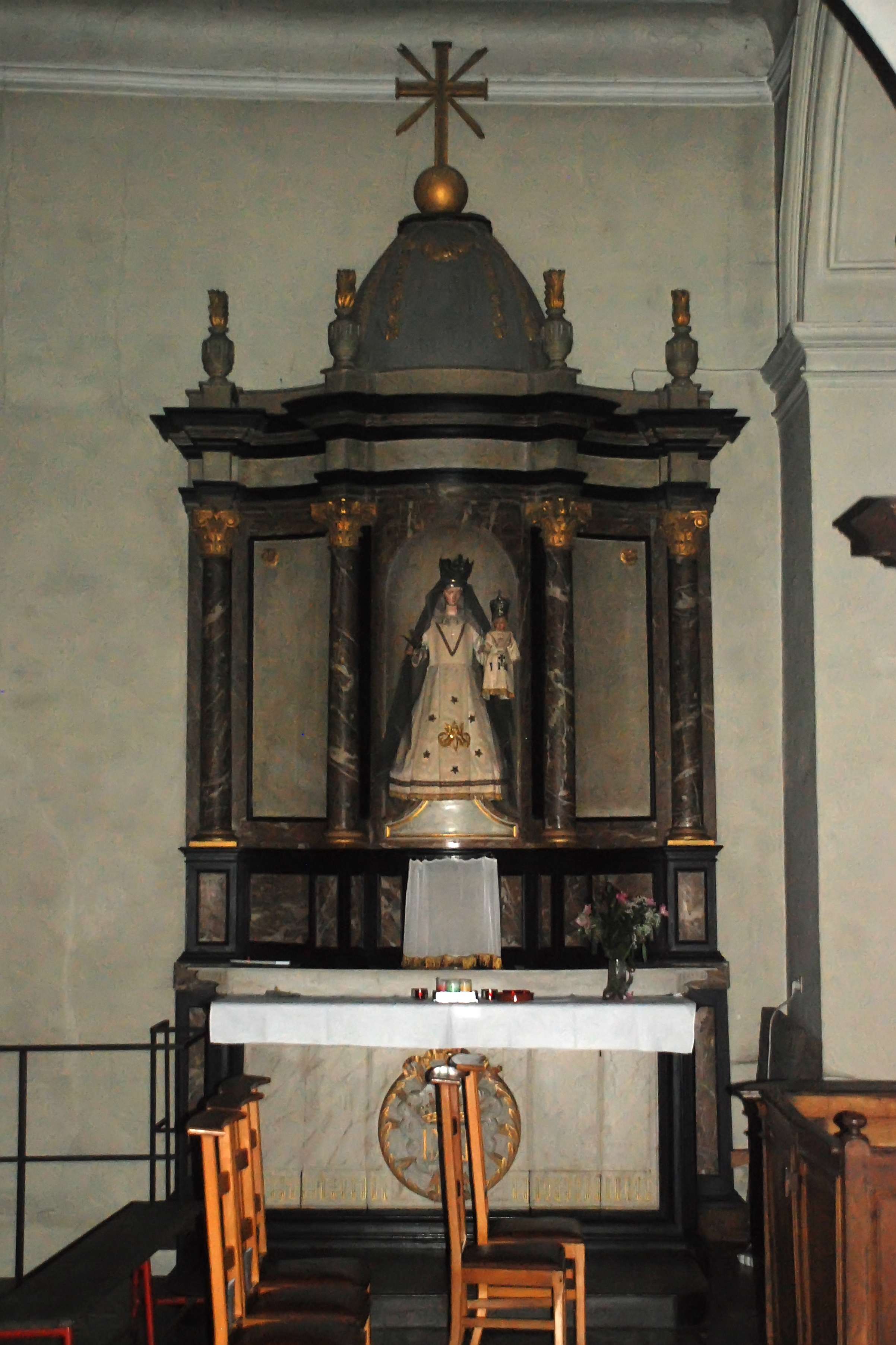 Belgique - Brabant wallon - Ottignies - Église Notre-Dame de Mousty